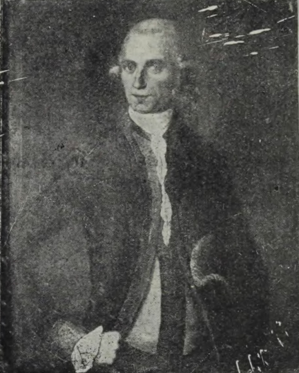 Беларуская (тарашкевіца): Партрэт Мацея Бутрымовіча (Maciej Butrymovič)